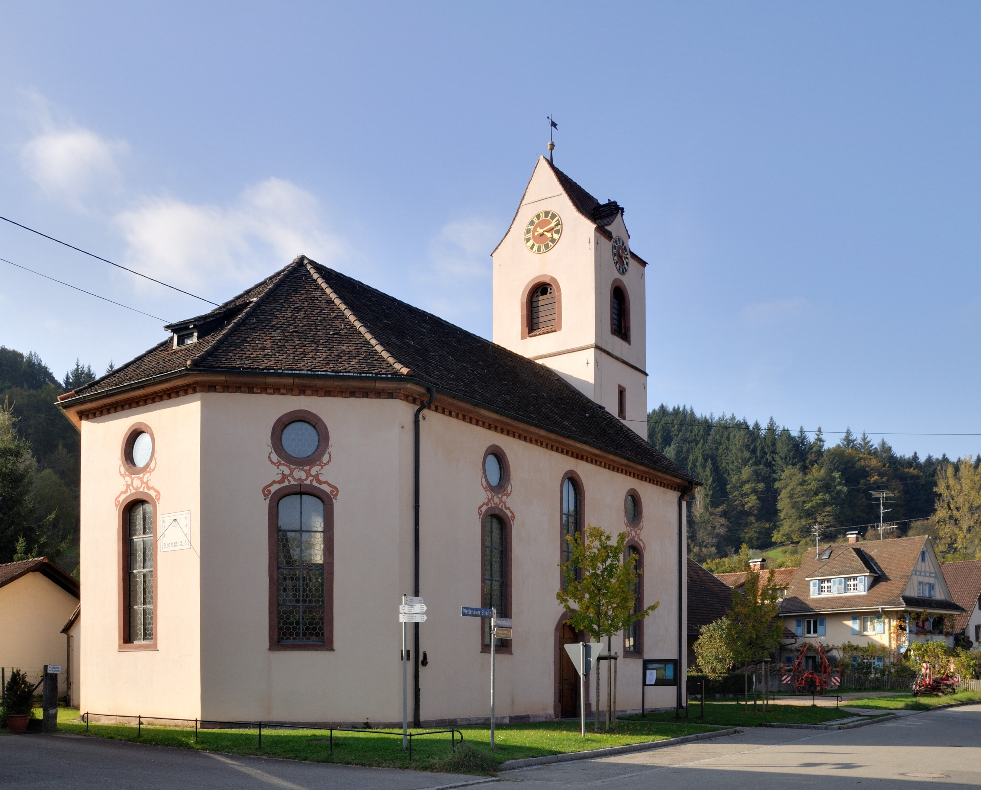 Wieslet: Dorfkirche